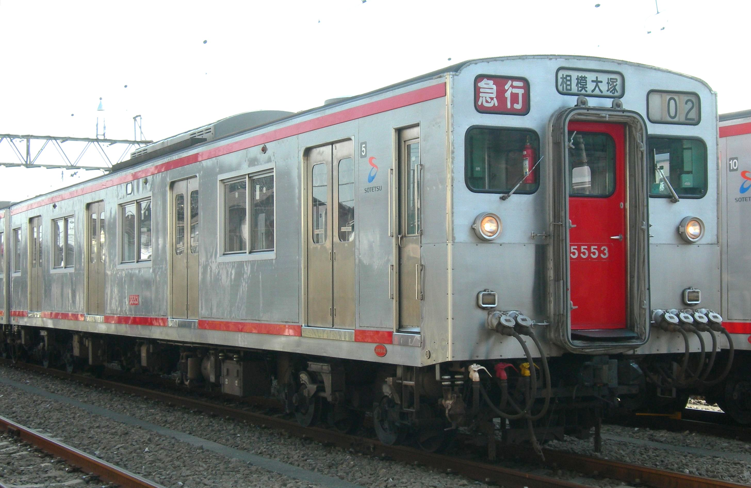 相模鉄道 5000系電車